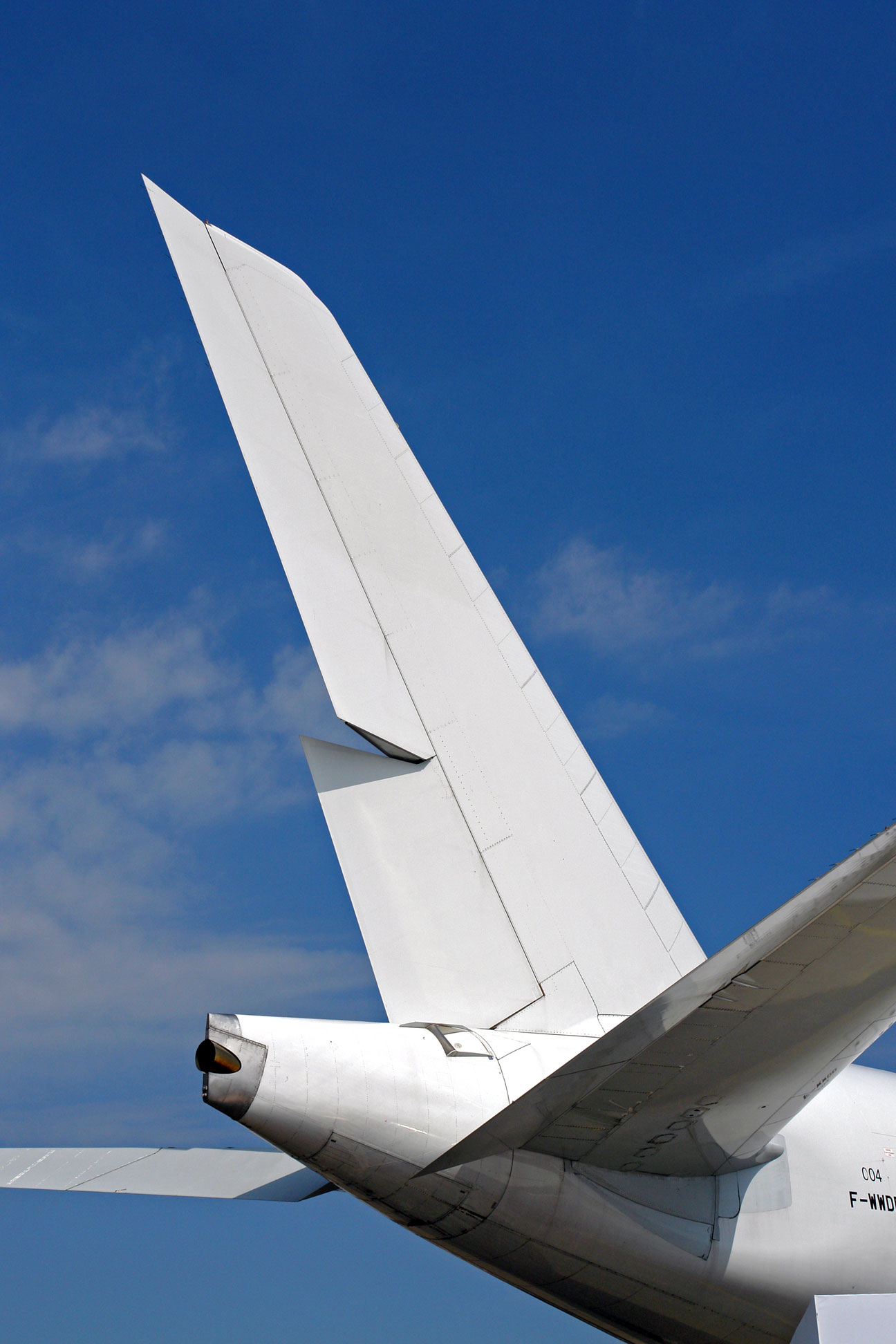 Airbus 380 tailplane